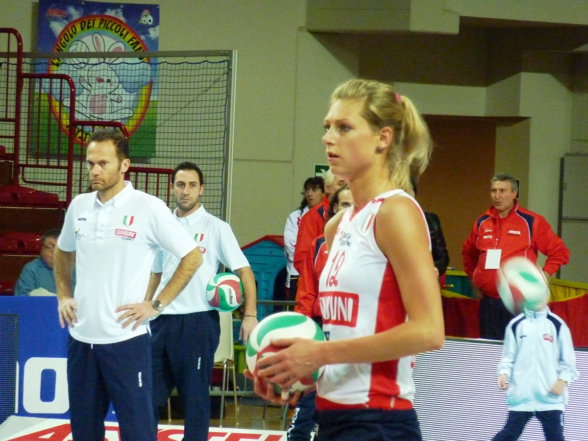 Manon Flier, pallavolista neerlandese, gioca nel ruolo di schiacciatrice ed opposto